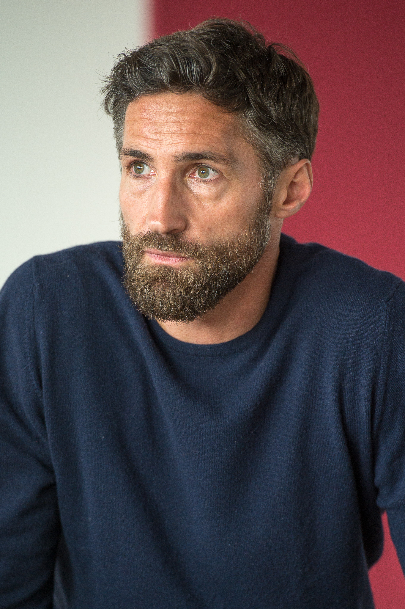 BR,Bayerischer Rundfunk,Bayerisches Fernsehen,Benjamin Sadler,Filmbrunch 2015